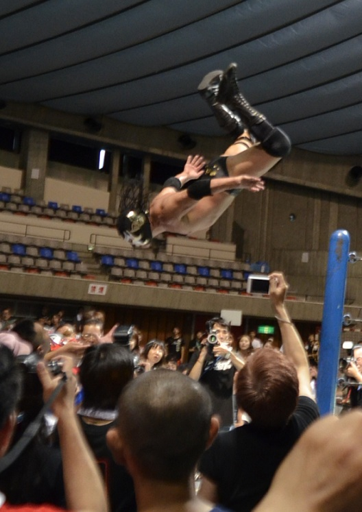 鉄柱越えトペ・コン・ヒーロ